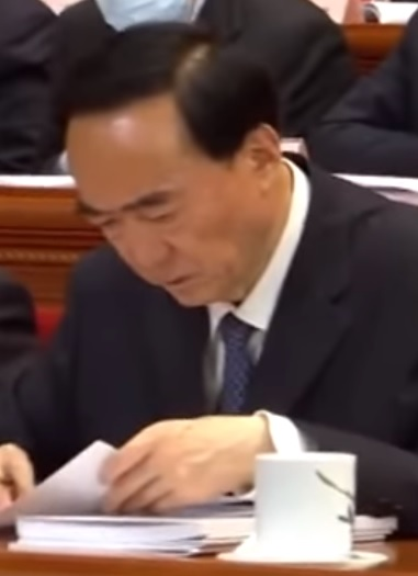 中央政治局委员陈全国在十三届全国人大三次会议上，2020年5月22日。